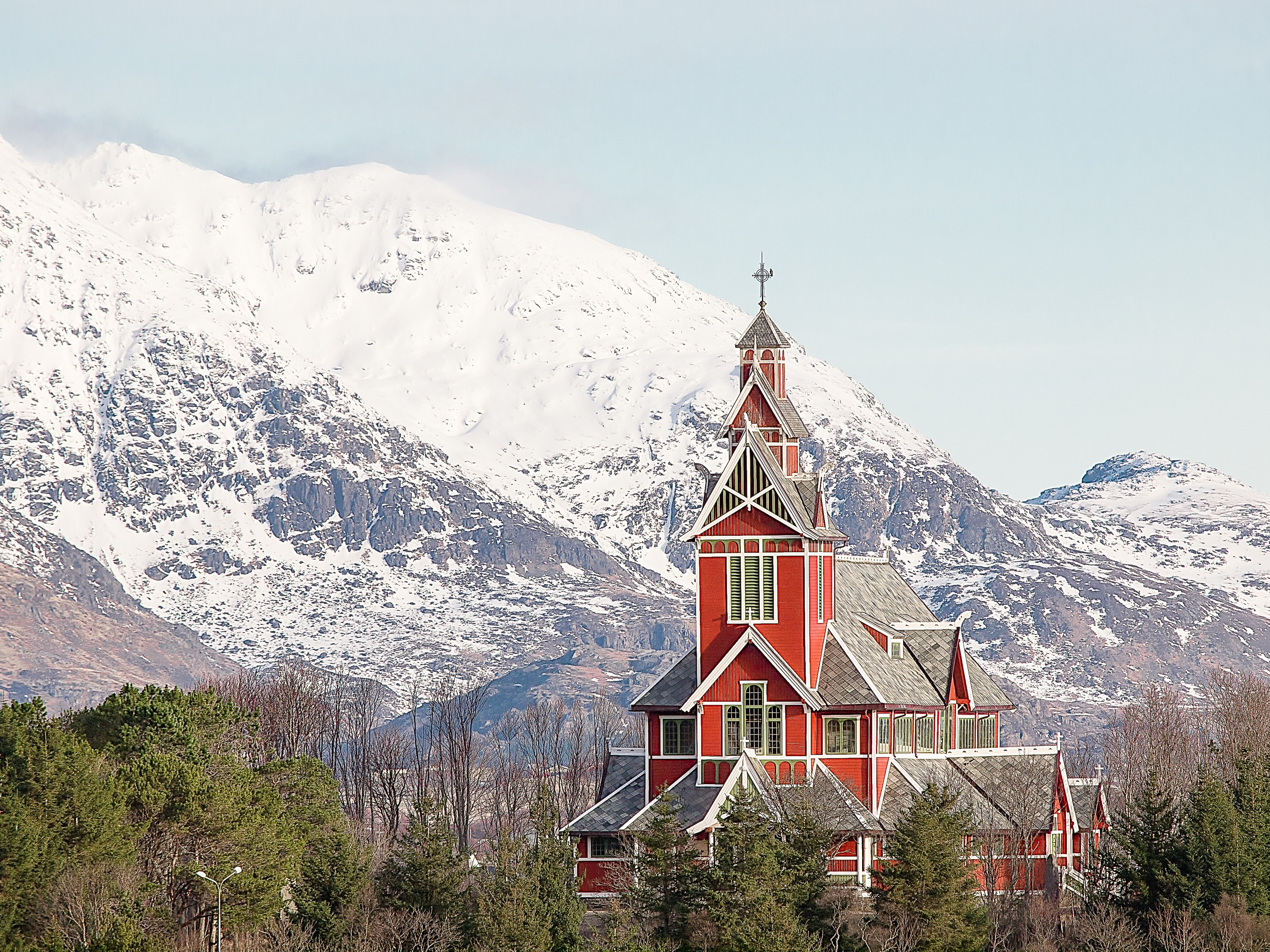 Церковь в коммуне Букснес